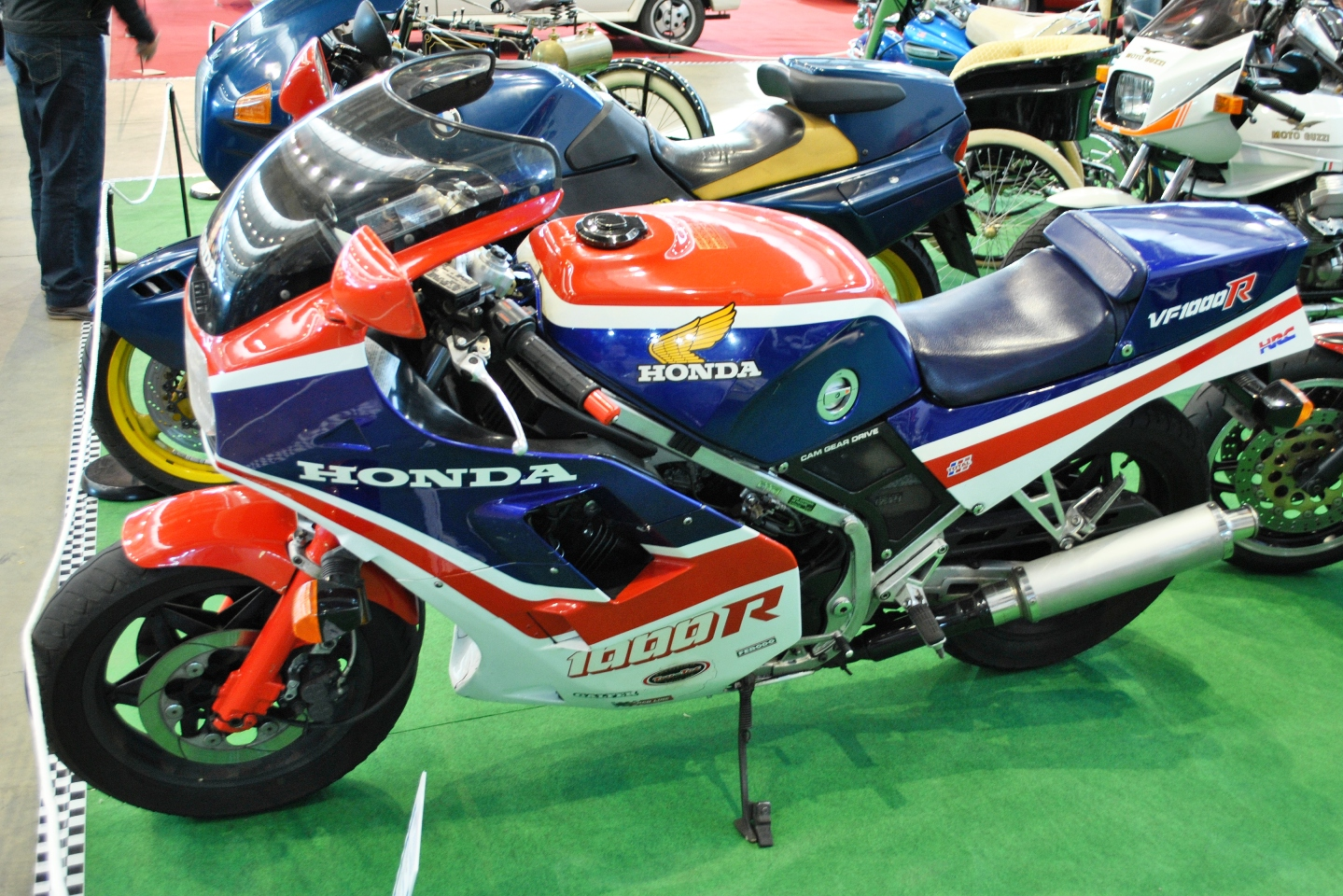 En España se vendieron 375 unidades. Era la moto más cara del mercado, con un precio superior a un millón y medio de pesetas.